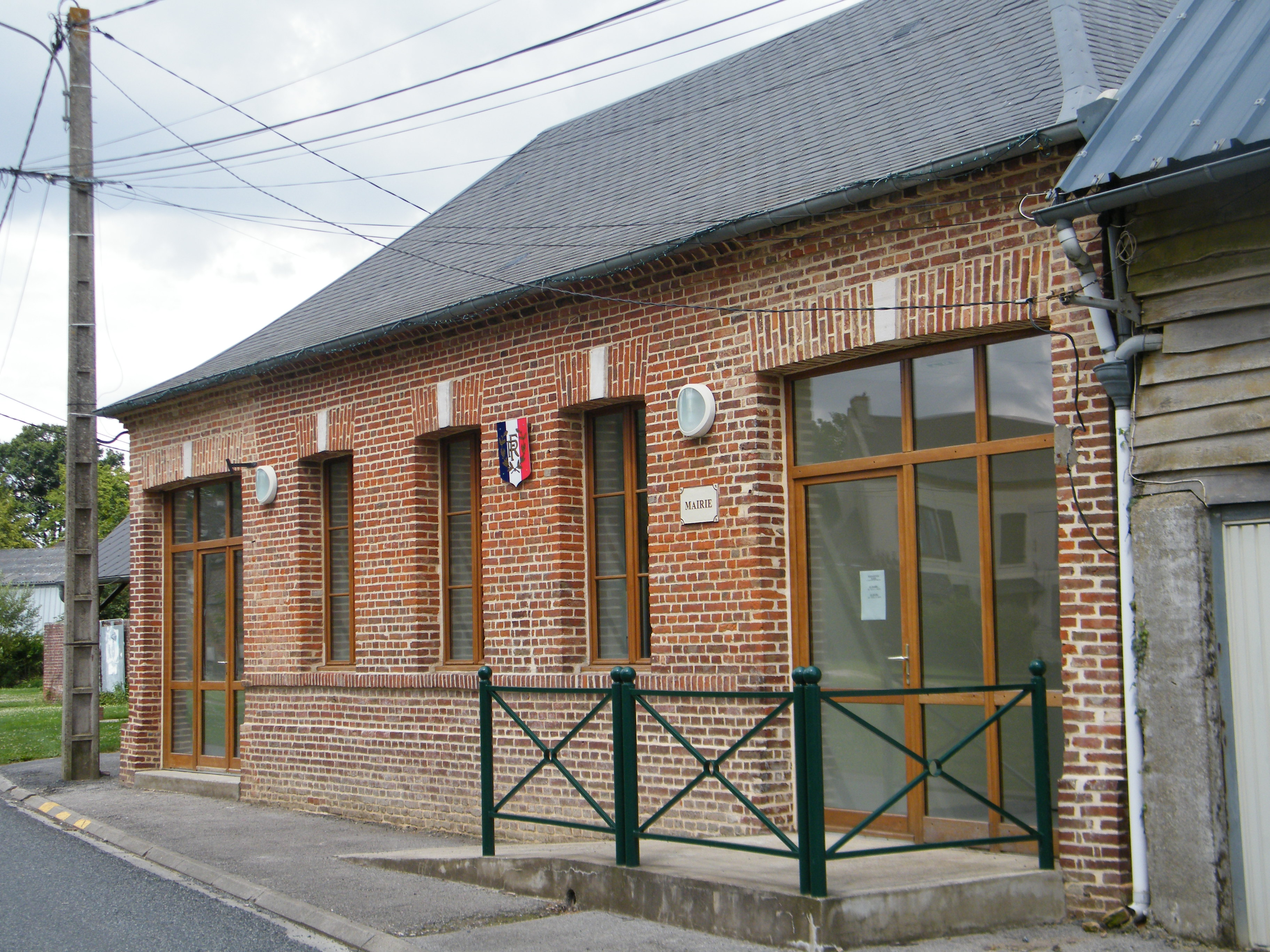 Mairie.